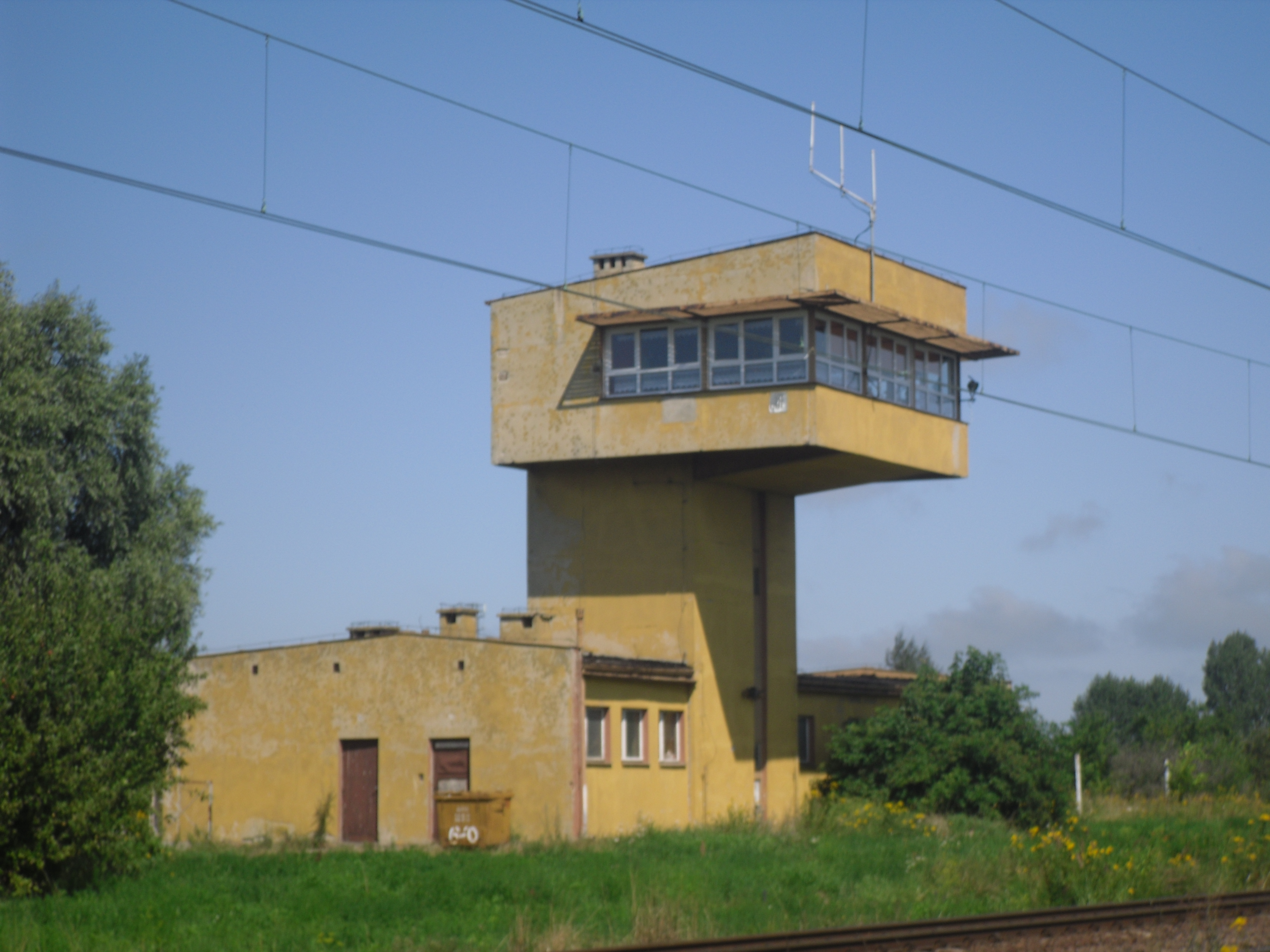 Nastawnia na stacji Gdańsk Olszynka.